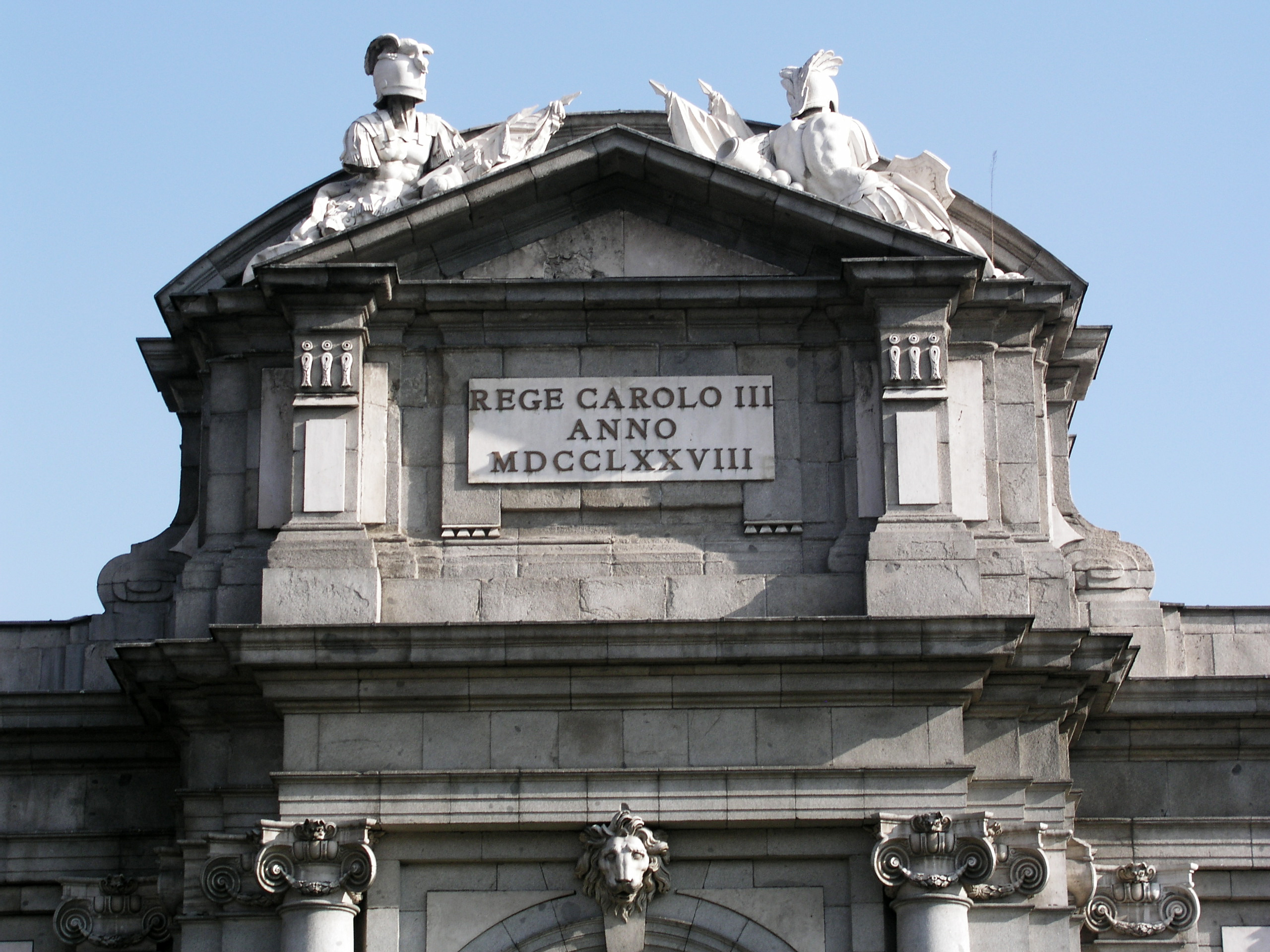 Puerta de Alcalá, Plaza de Independencia, Madrid, Spain. Detail: central portal on west side